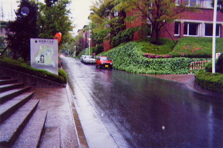 shizuoka kenritsu univ Japan 静岡県立大学 (静岡県立大学)